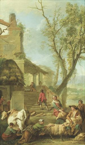 "Les Saisons" ("The Seasons") by French painter Jean-Baptiste Marie Pierre. Musée lorrain, Nancy, France.